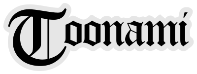 Quinto logo de Toonami usado desde 2003 hasta 2004